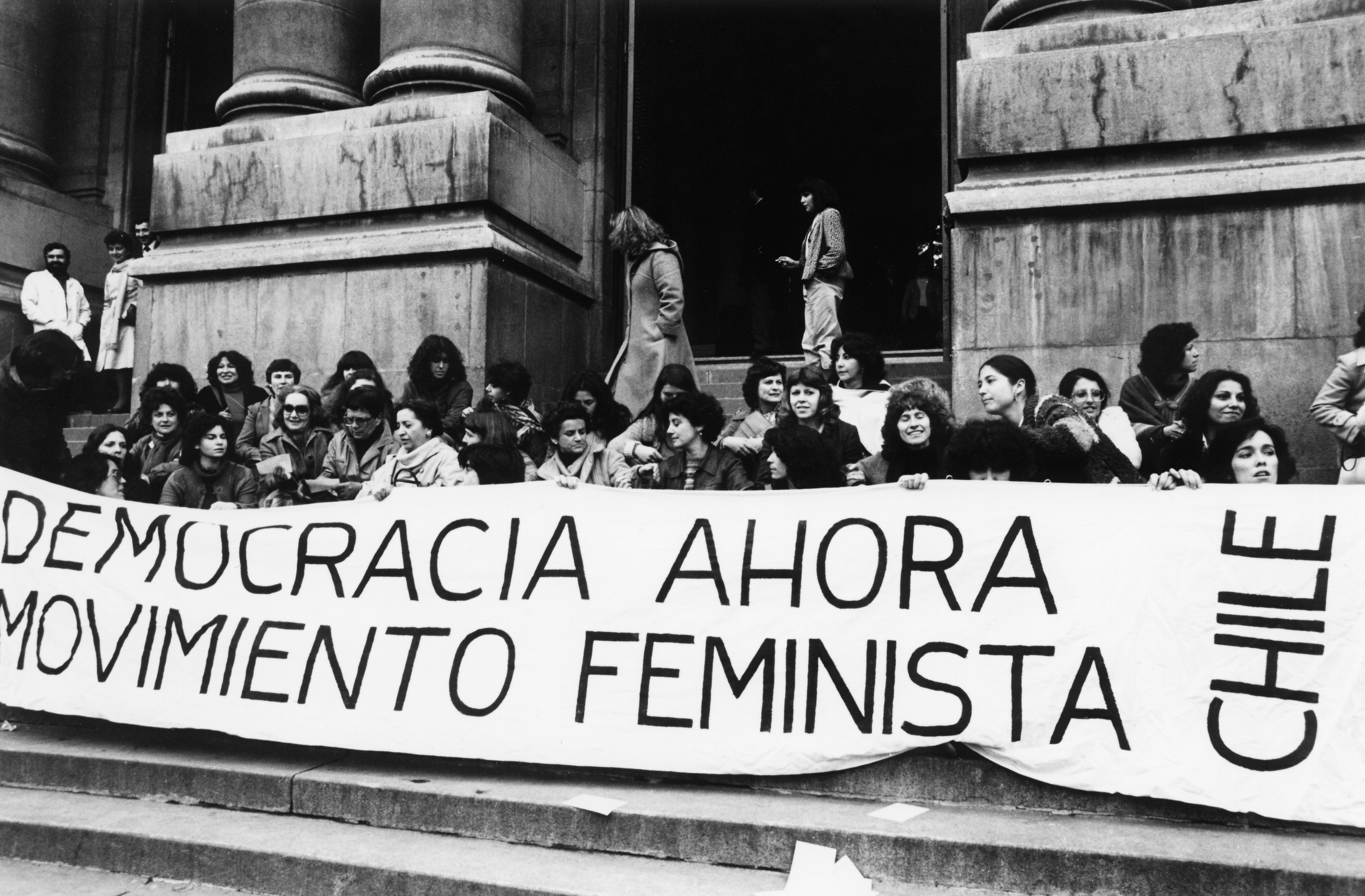 Mujeres feministas se manifiestan en Santiago de Chile, pidiendo democracia durante el gobierno militar de Augusto Pinochet.